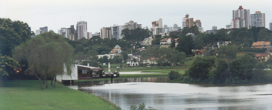 Parque Barigüi - Bar sobre o lago.